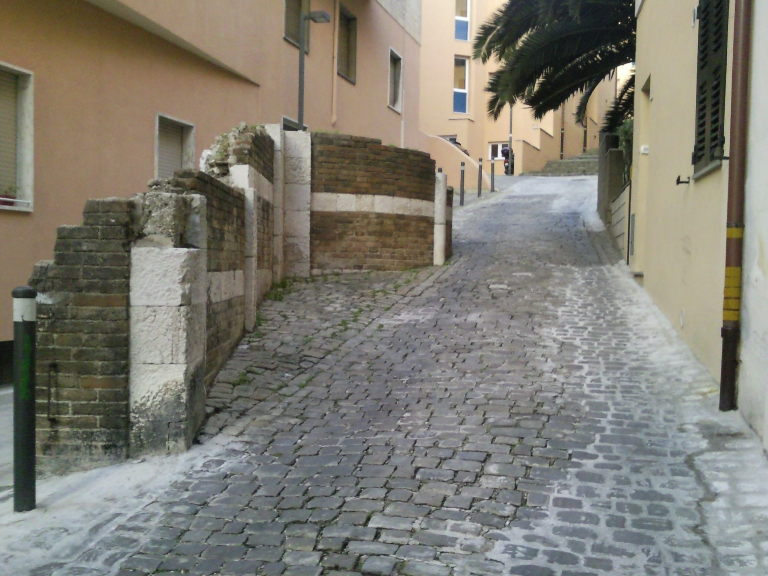 Vestigia dell'abside della Chiesa di S.Pietro, vista da via Scosciacavalli.